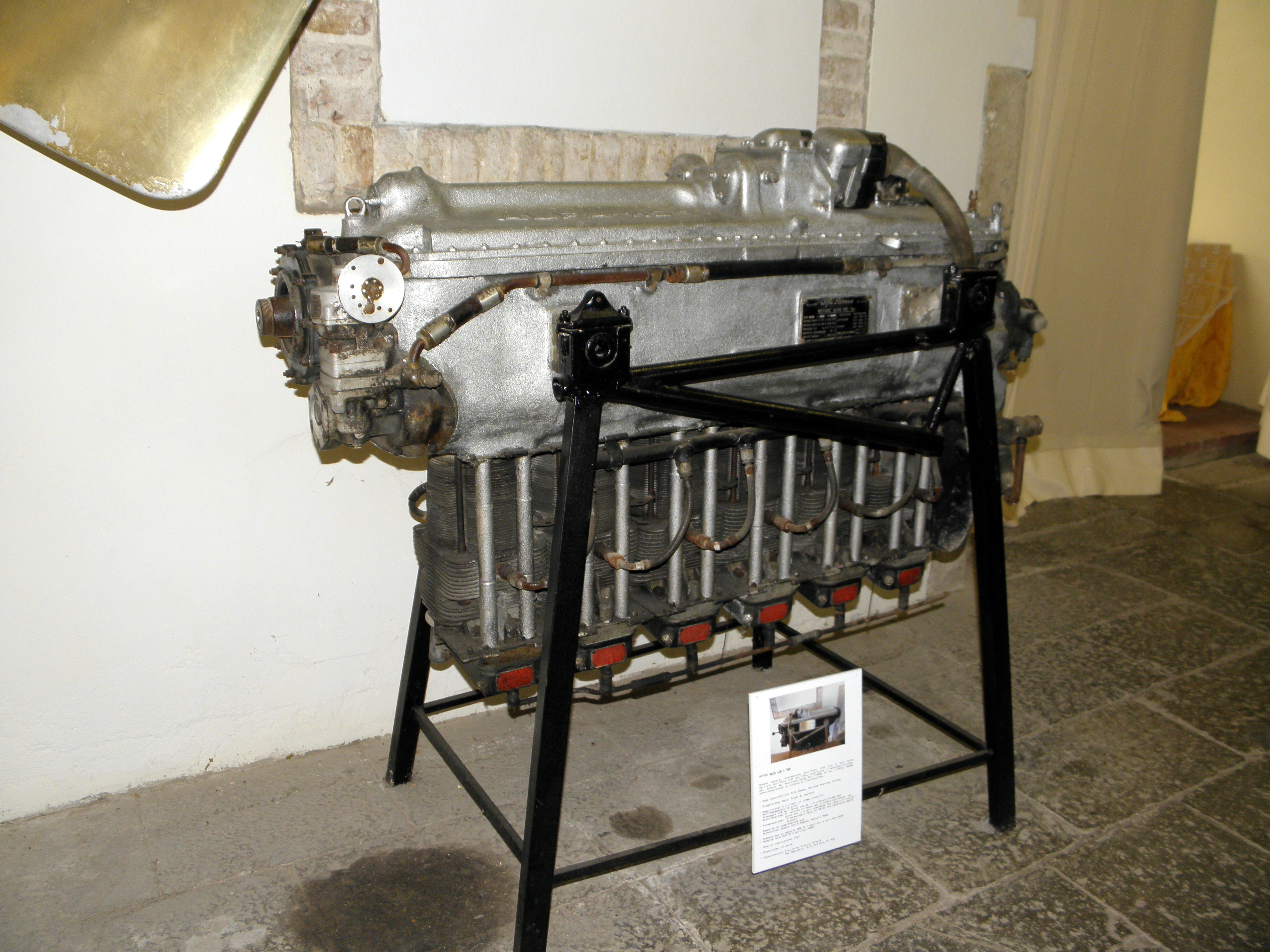 San Pelagio, frazione di Due carrare: Museo dell'aria, il motore aeronautico Alfa Romeo 115ter in esposizione al museo.